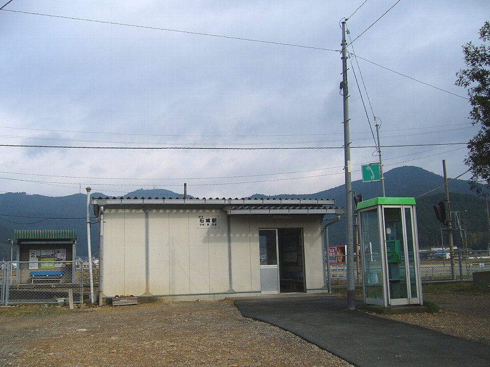 予讃線伊予石城駅